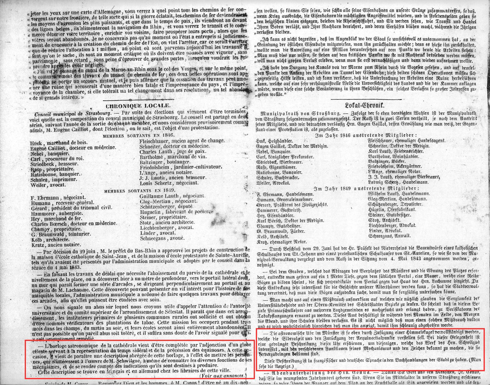 Extrait de la seconde page du courrier du Bas-Rhin du 2 juillet 1843.